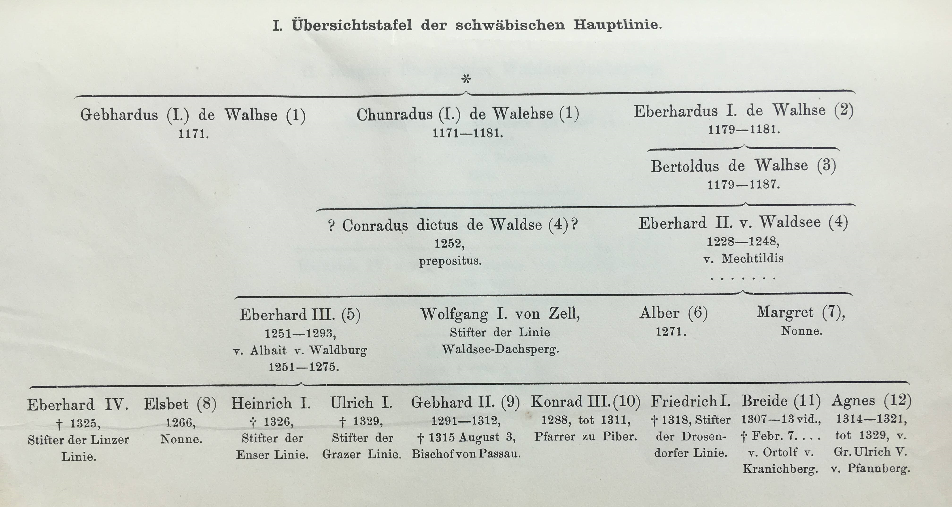 Linie Walsee I (Doblinger 1906)